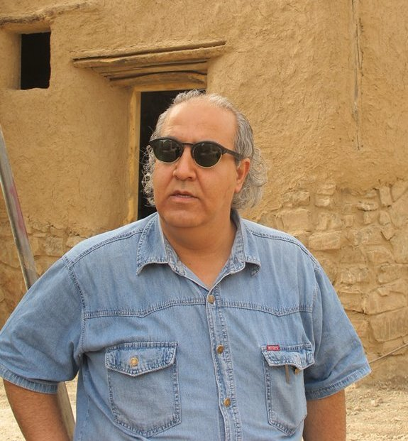 حسن نجفی در پشت صحنه فیلم آسمان مال ماست